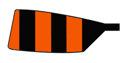 Blad van Roeivereniging DieLeythe